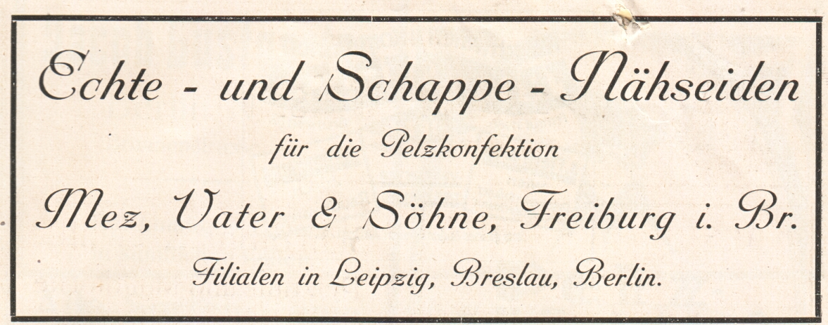 Anzeige der Garnfabrik Mez, Vater & Söhne, Freiburg i. Br. Filialen in Leipzig, Breslau, Berlin Echte und Schappe-Nähseiden für die Pelzkonfektion aus Der Rauchwarenmarkt, Berlin, 1922, Seite 43